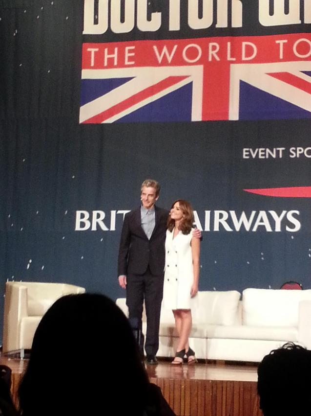 Doctor who World Tour Korea